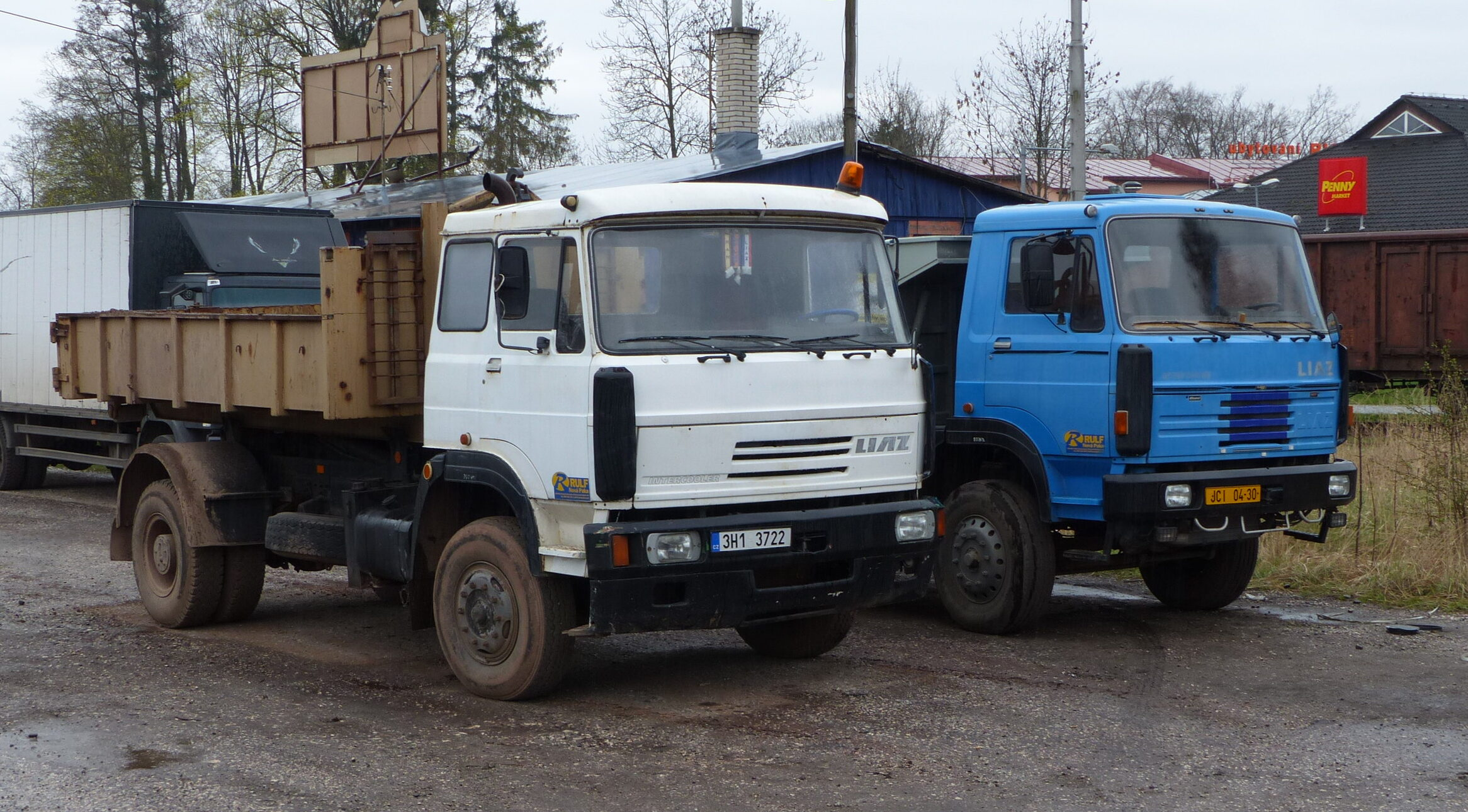 LIAZ 110.051 (bílý) - hákový nosič kontejnerů ¨ LIAZ 150.261 (modrý) - třístranný stavební sklápěč